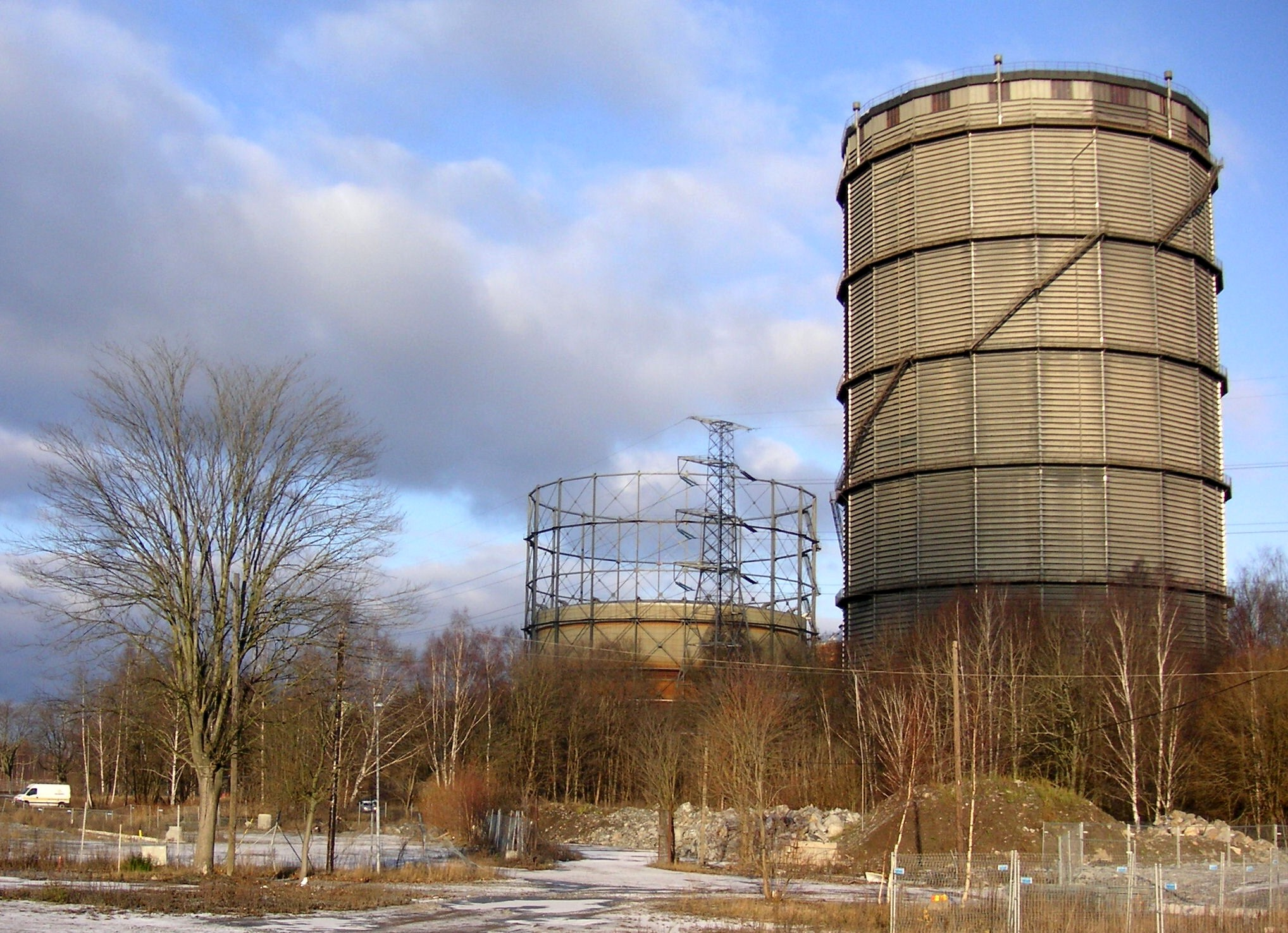 Gasklockorna 3 och 4 i Hjorthagen i Stockholm